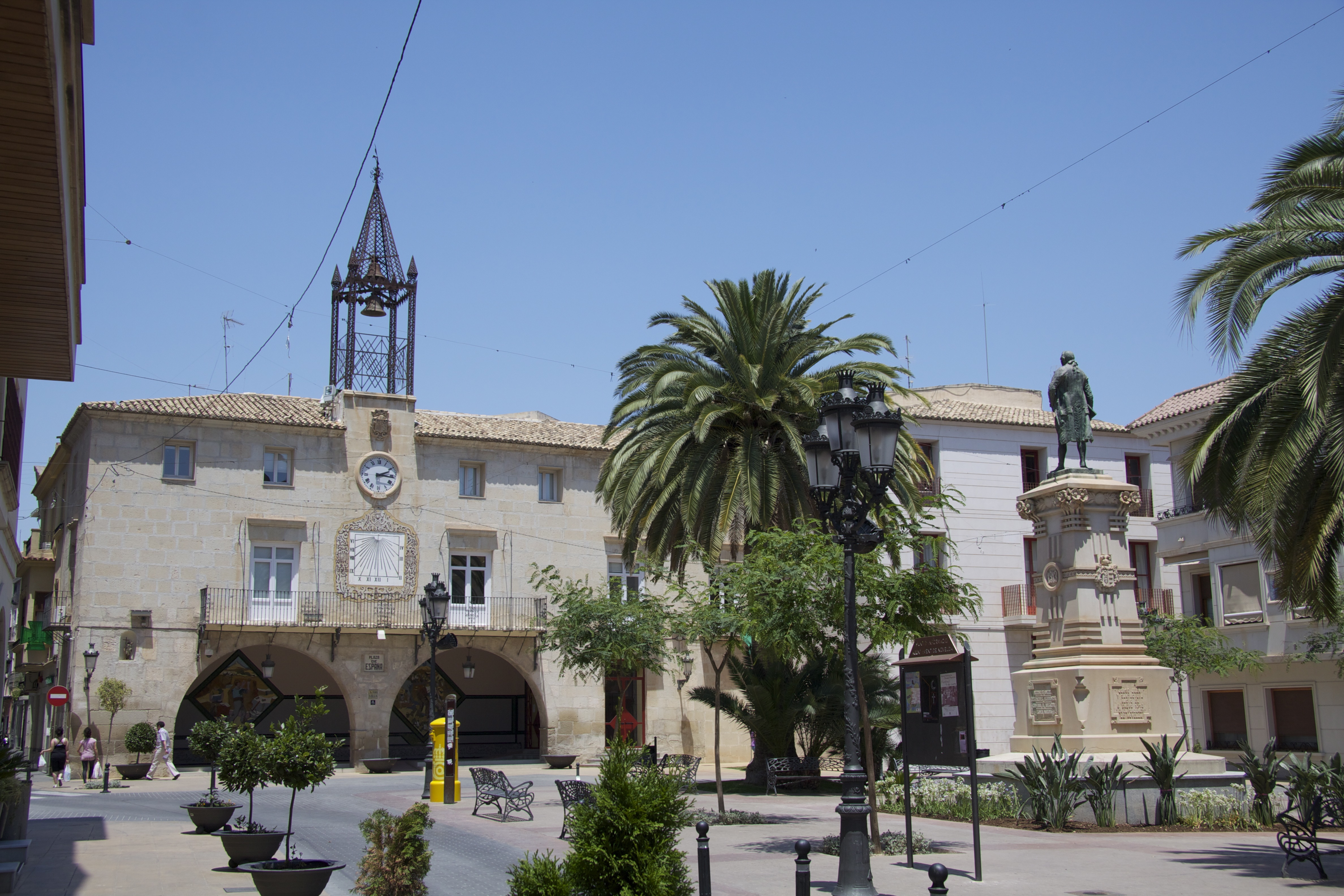 Ayuntamiento de Novelda, Plaza de España, Novelda, prov. de Alicante